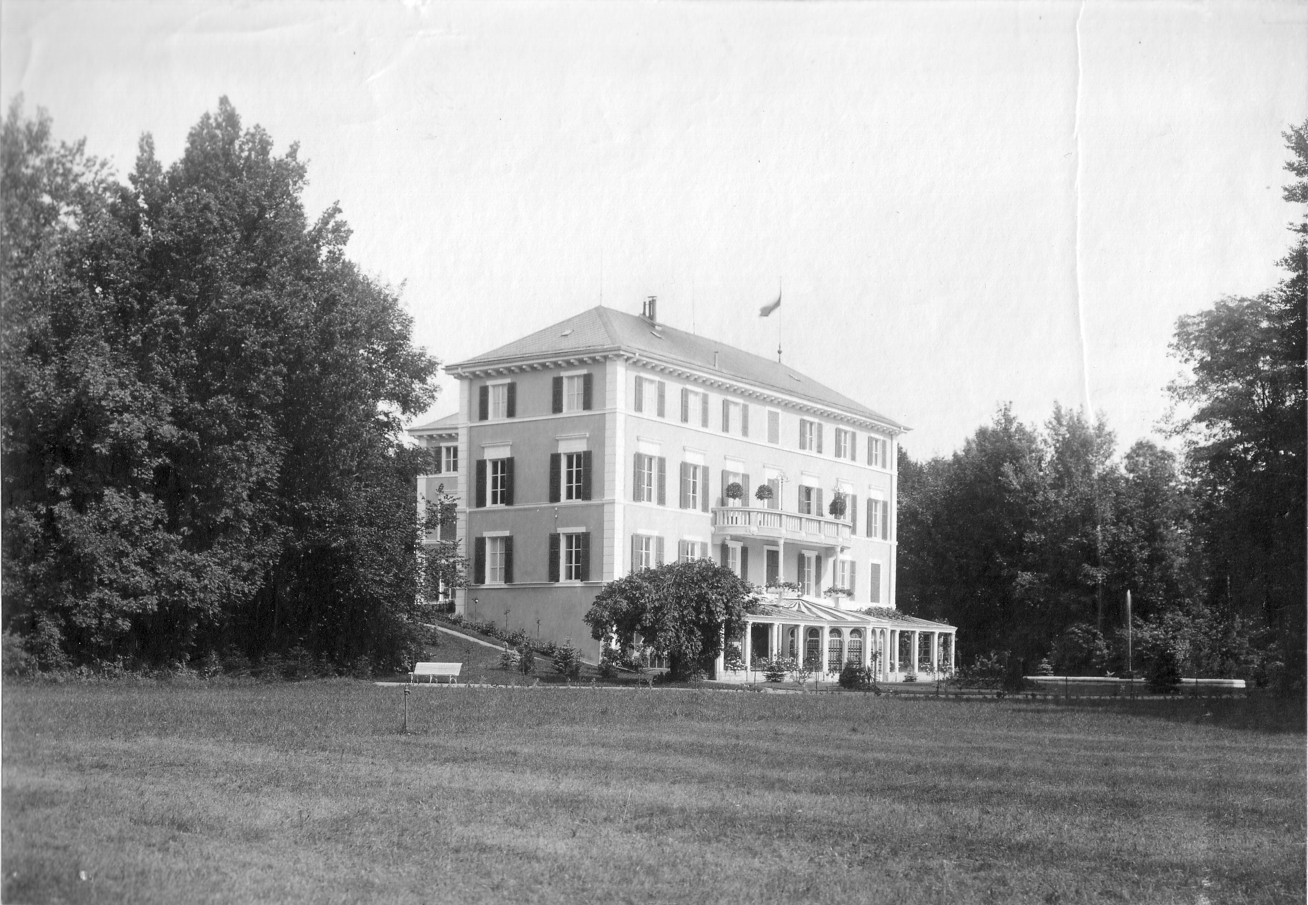 Schloss Burgellern um 1900